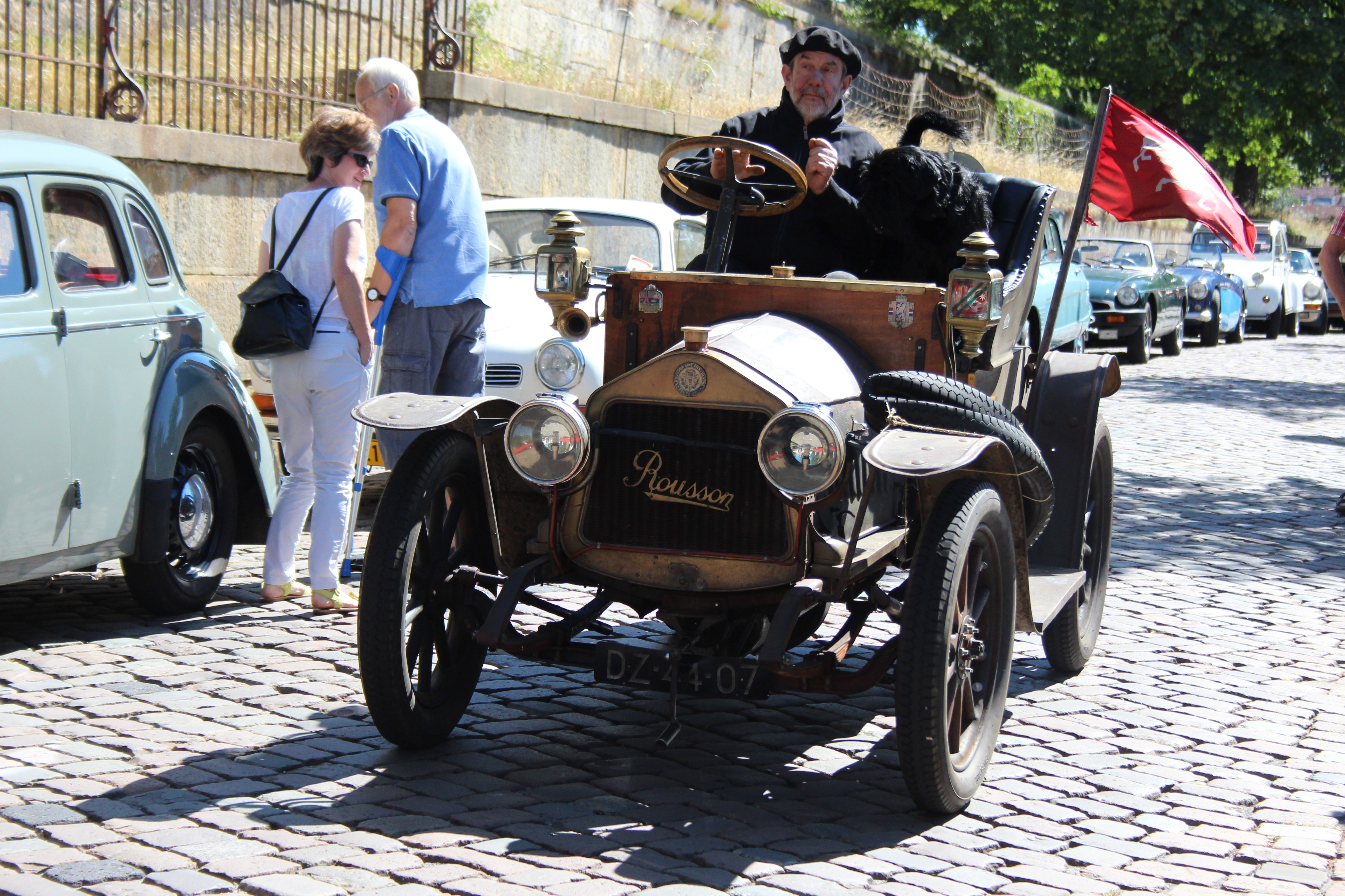 1908 Rousson Oldtimertreffen Bad Bentheim Burg 01.07.2018